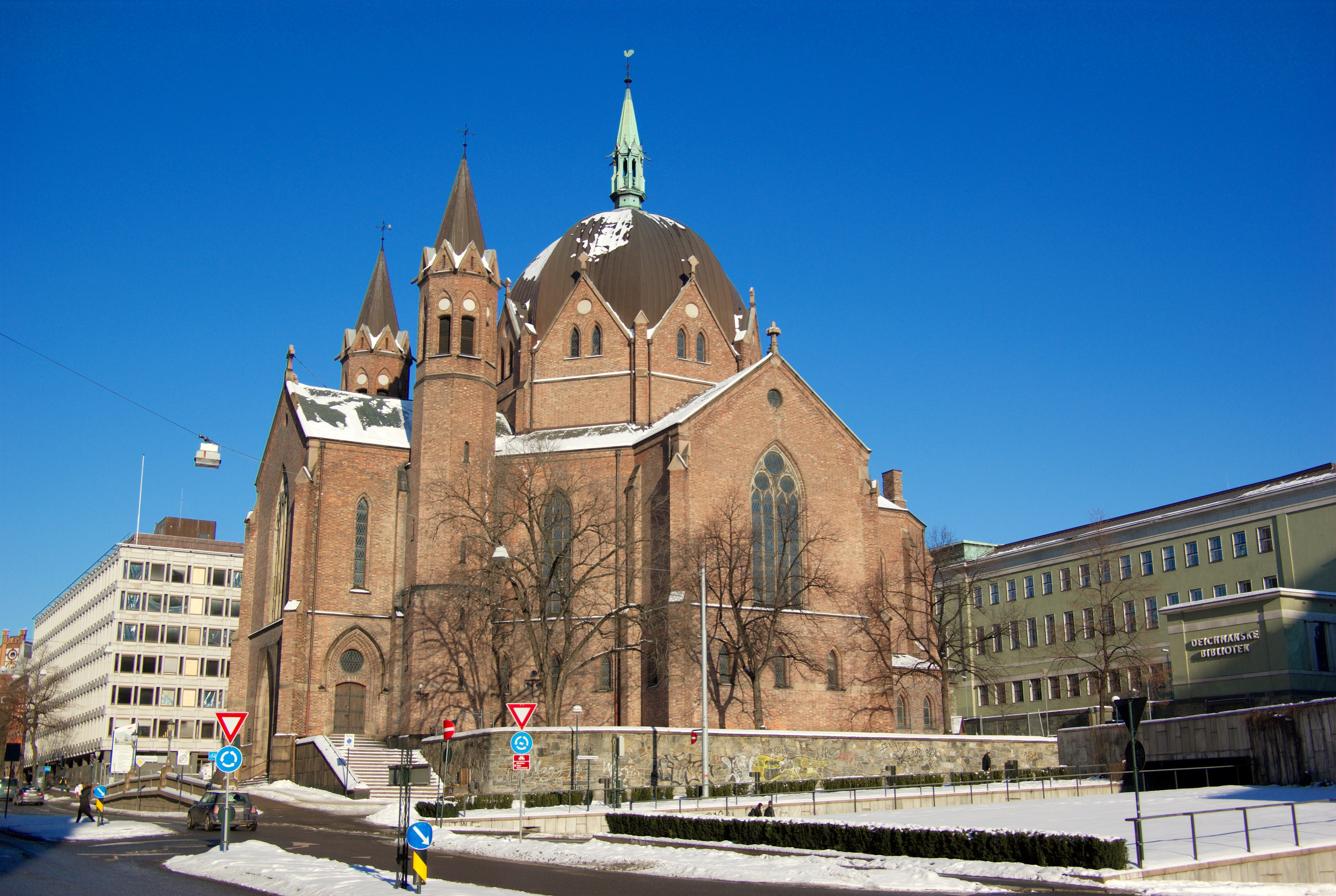 Trefoldighetskirken Oslo, Norway.